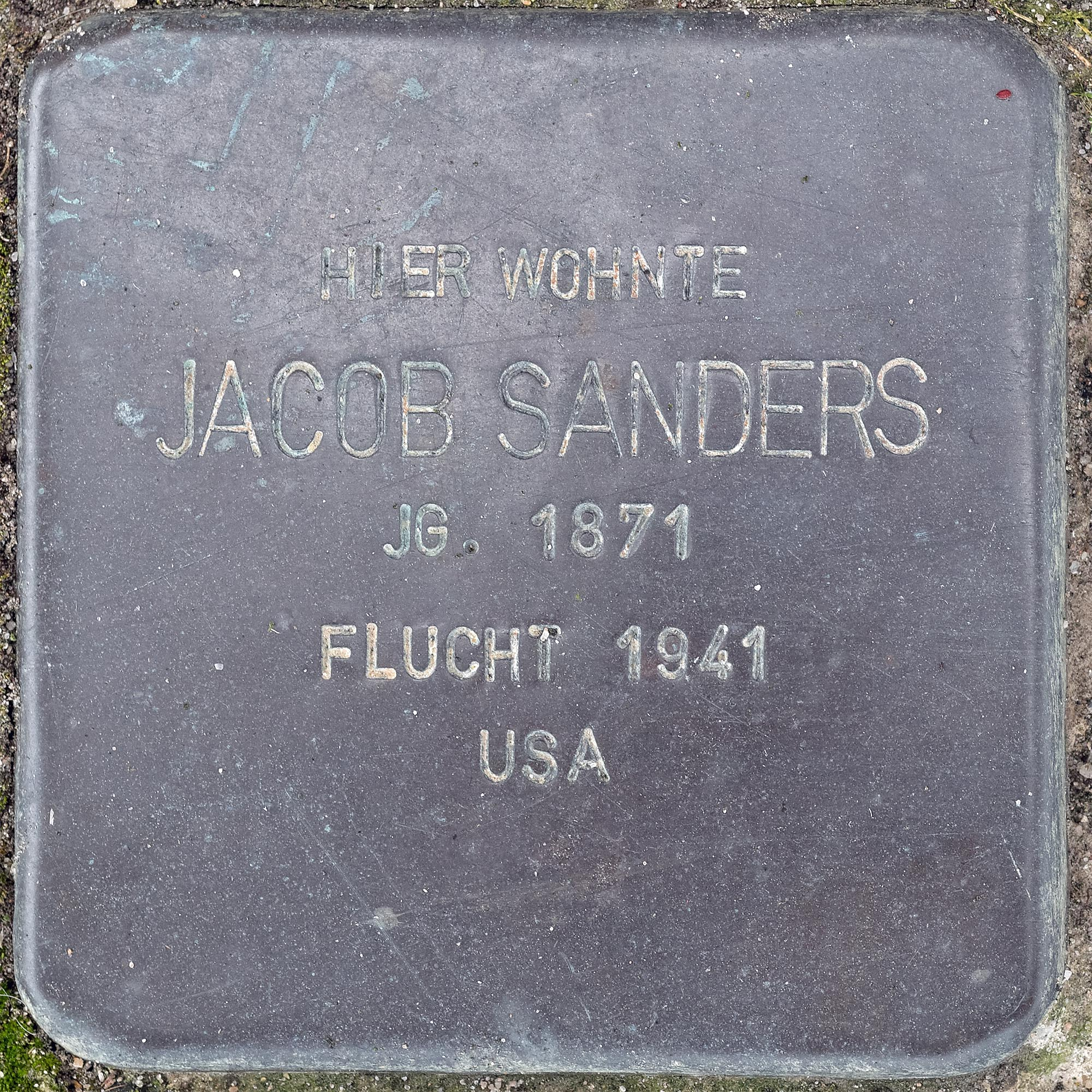 Stolperstein Sanders, Jacob